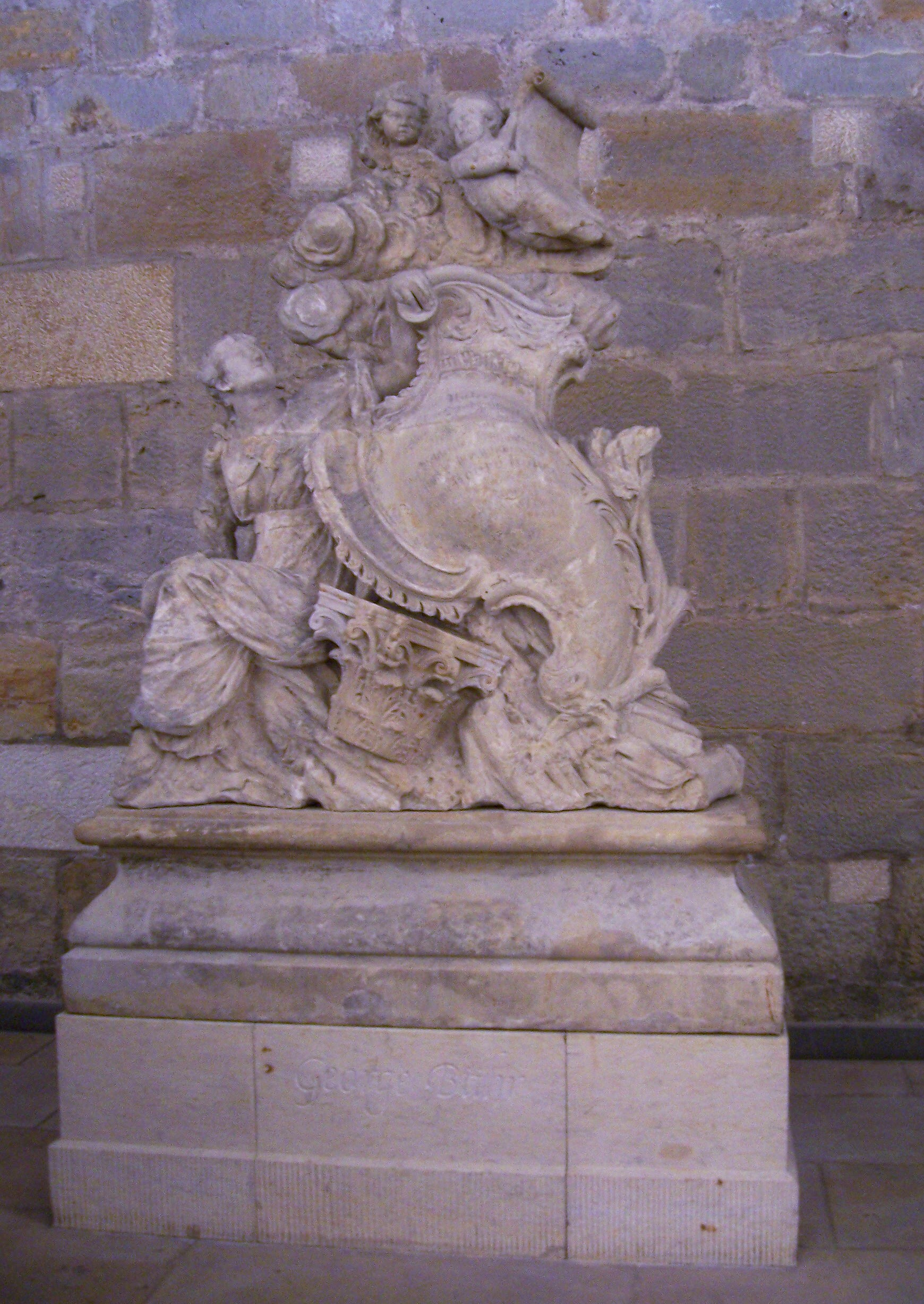 Grab George Bährs in den Katakomben der Frauenkirche, das sich ursprünglich auf dem alten Johannisfriedhof befand.